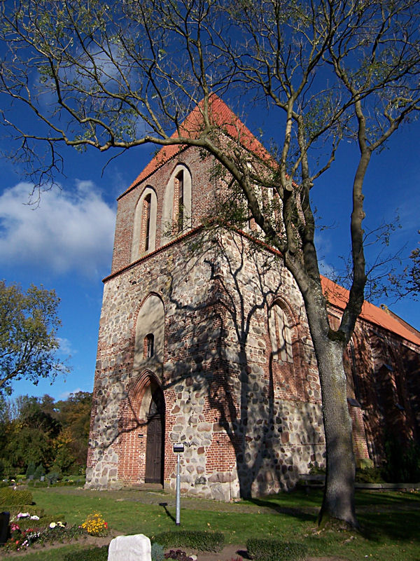 Kirche in Steinhagen, Mecklenburg-Vorpommern